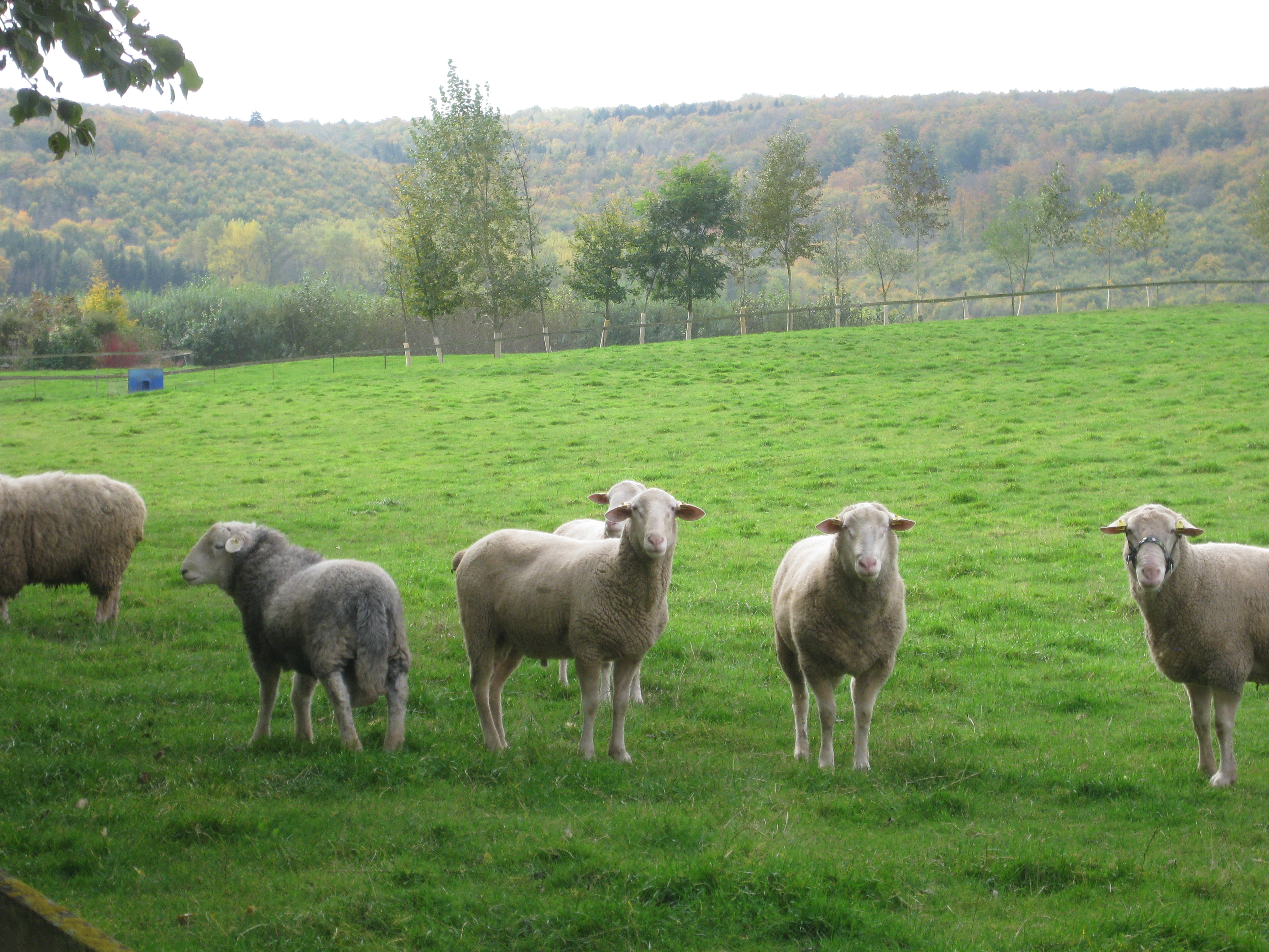 Landwirtschaftlicher Betrieb in Beinrode mit Leineschafen?